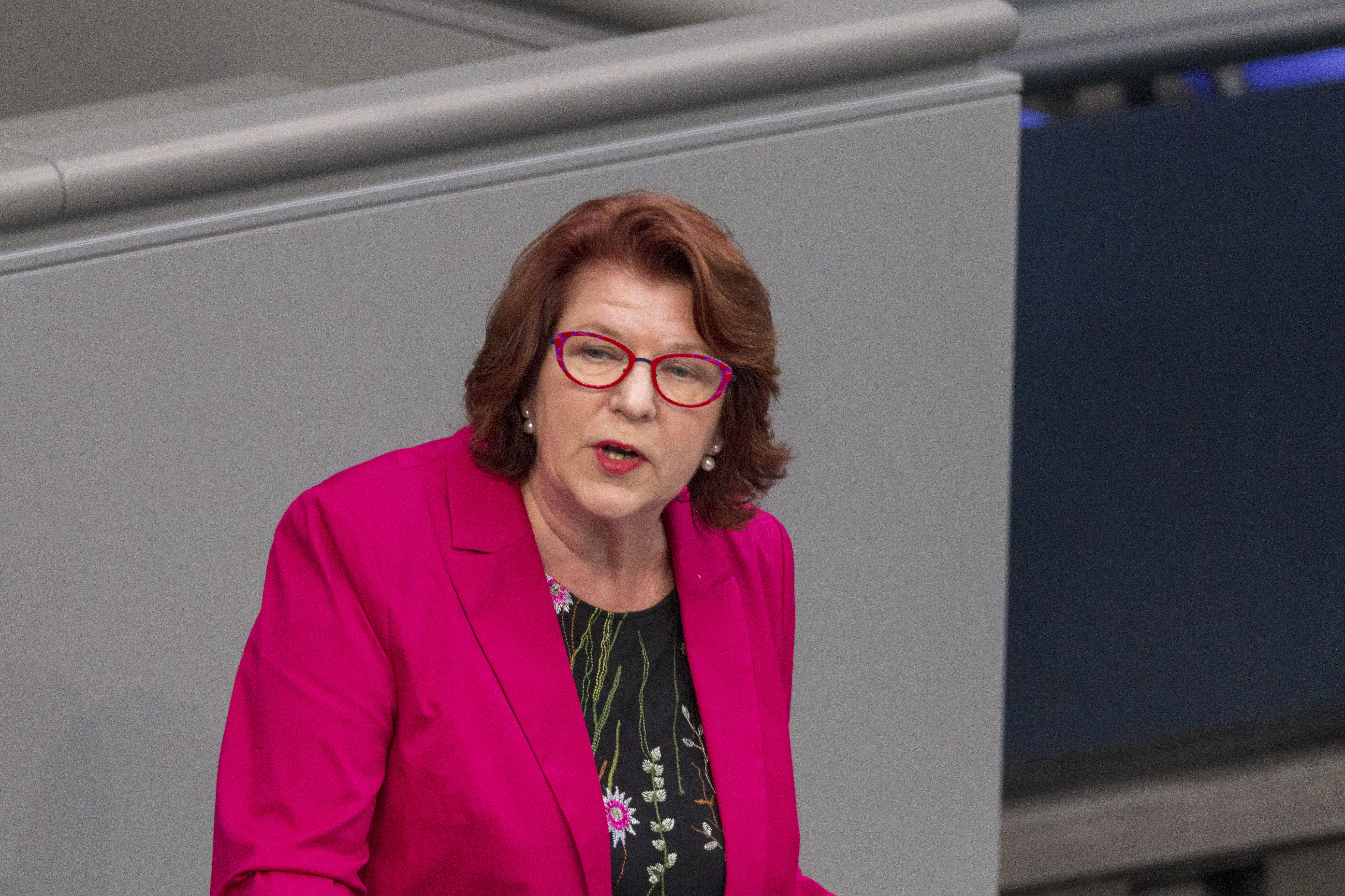 Antje Lezius, Bundestagsabgeordnete der CDU während der Plenarsitzung des Deutschen Bundestages am 2. Juli 2020 in Berlin.